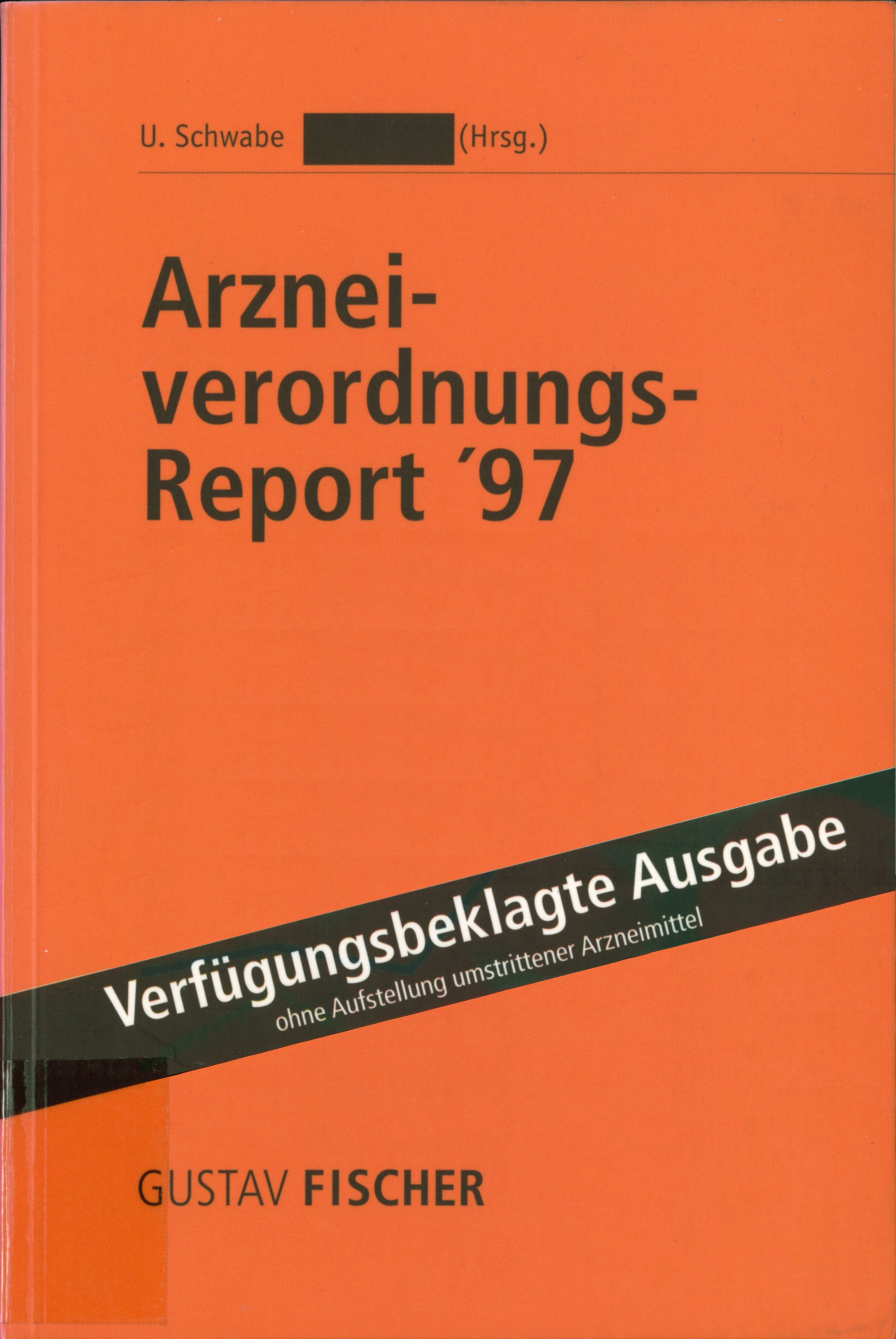 Umschlag des Arzneiverordnungs-Reports 97